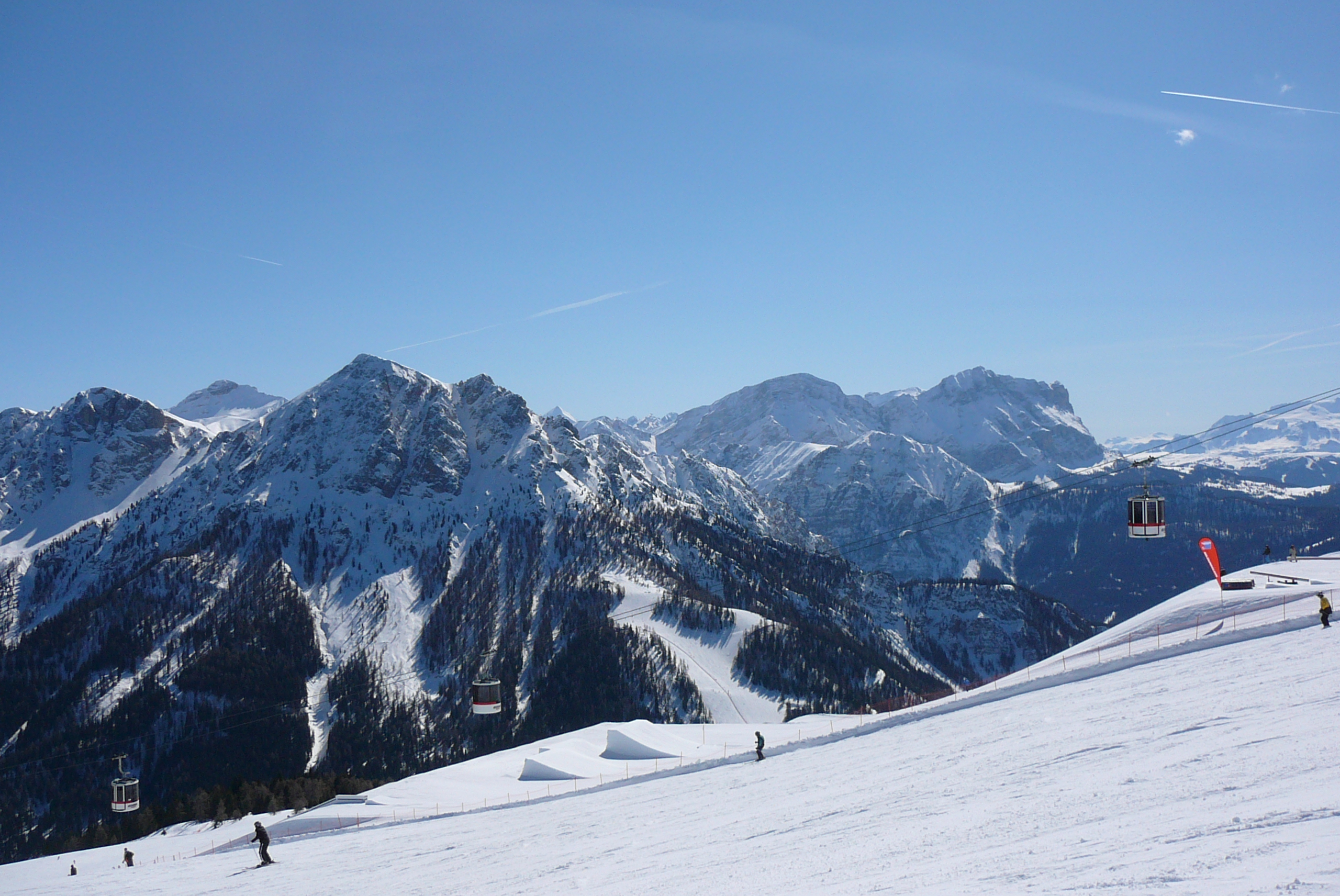 Pohled na sjezdovku Pre da Peres.